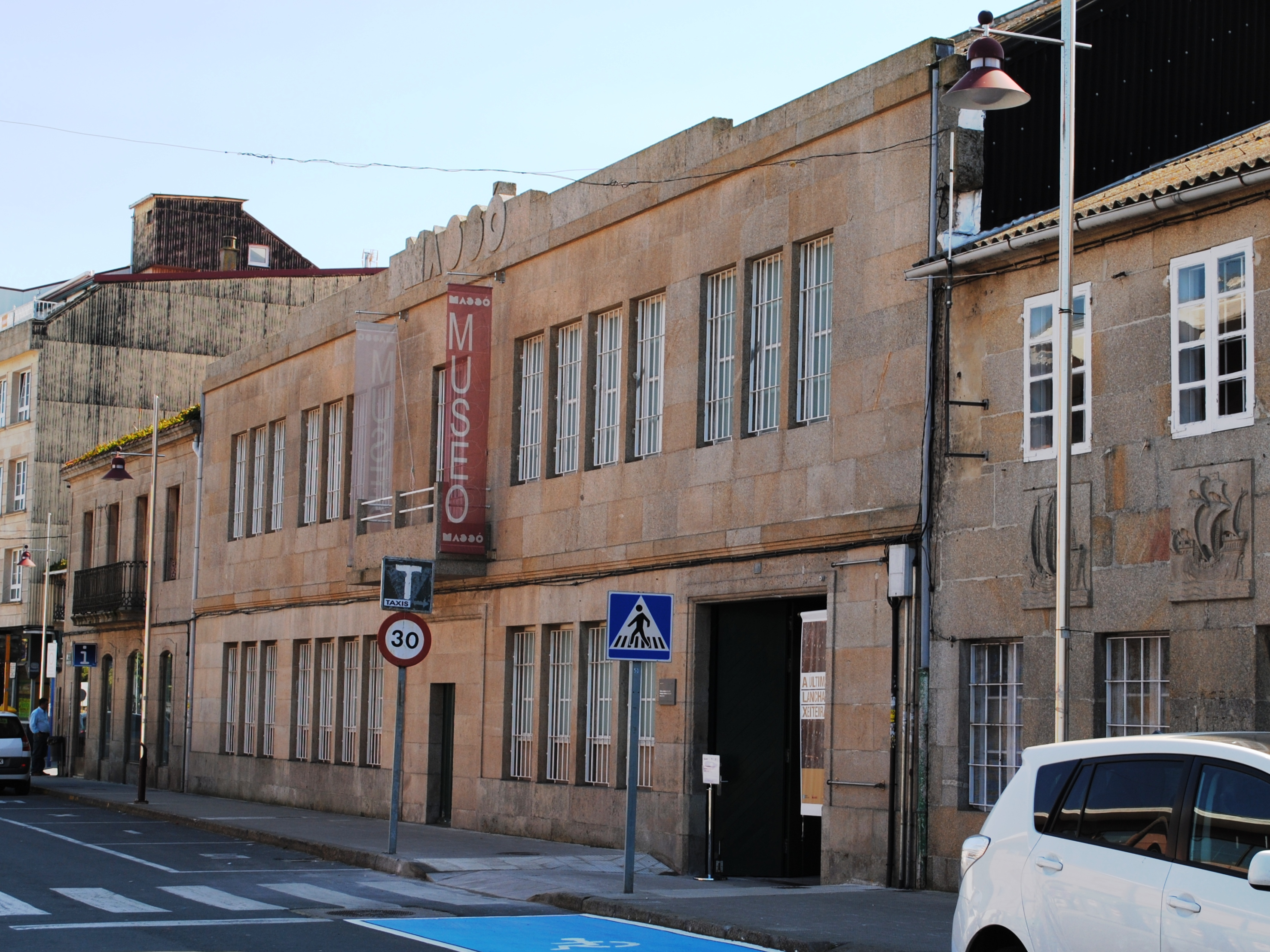 Bueu, Nuseo Massó